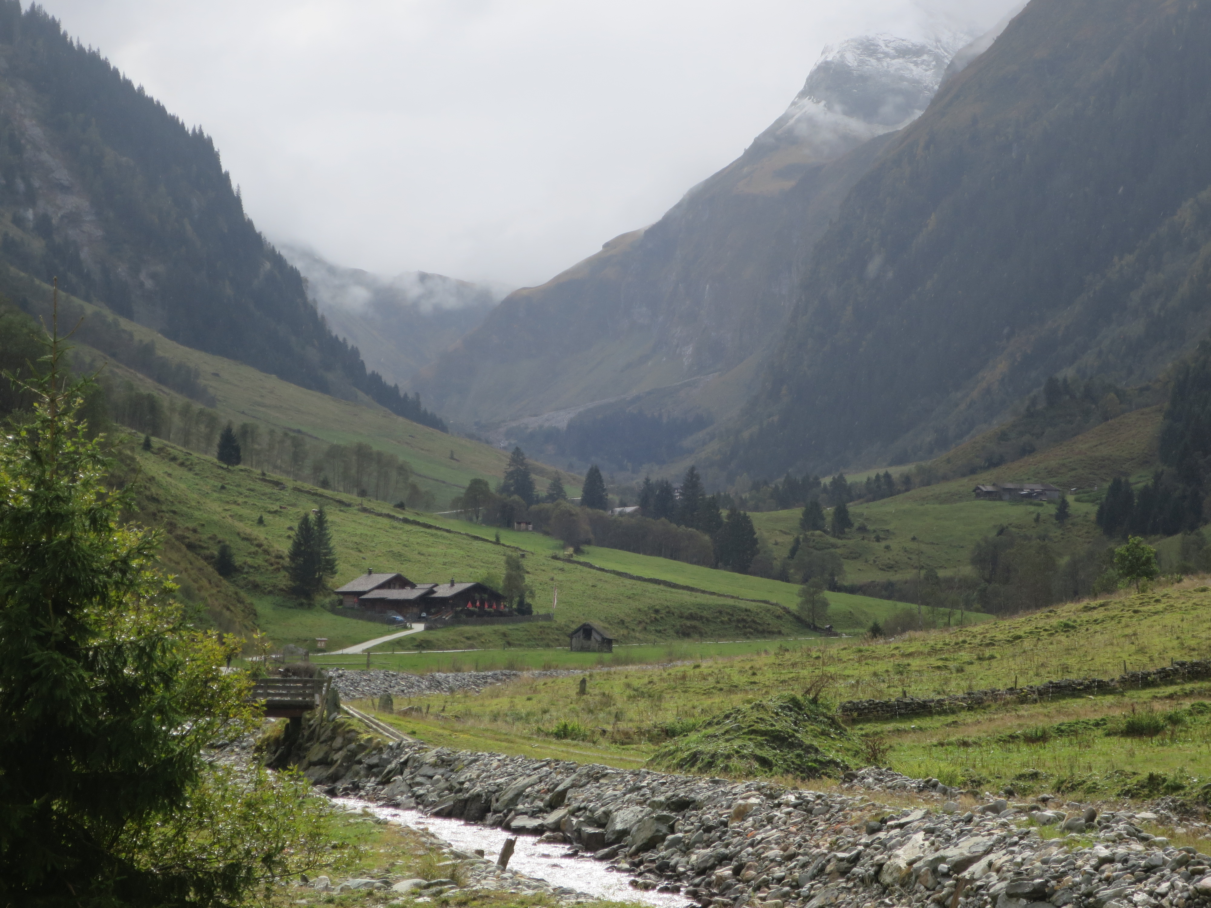 Senningerbräualm